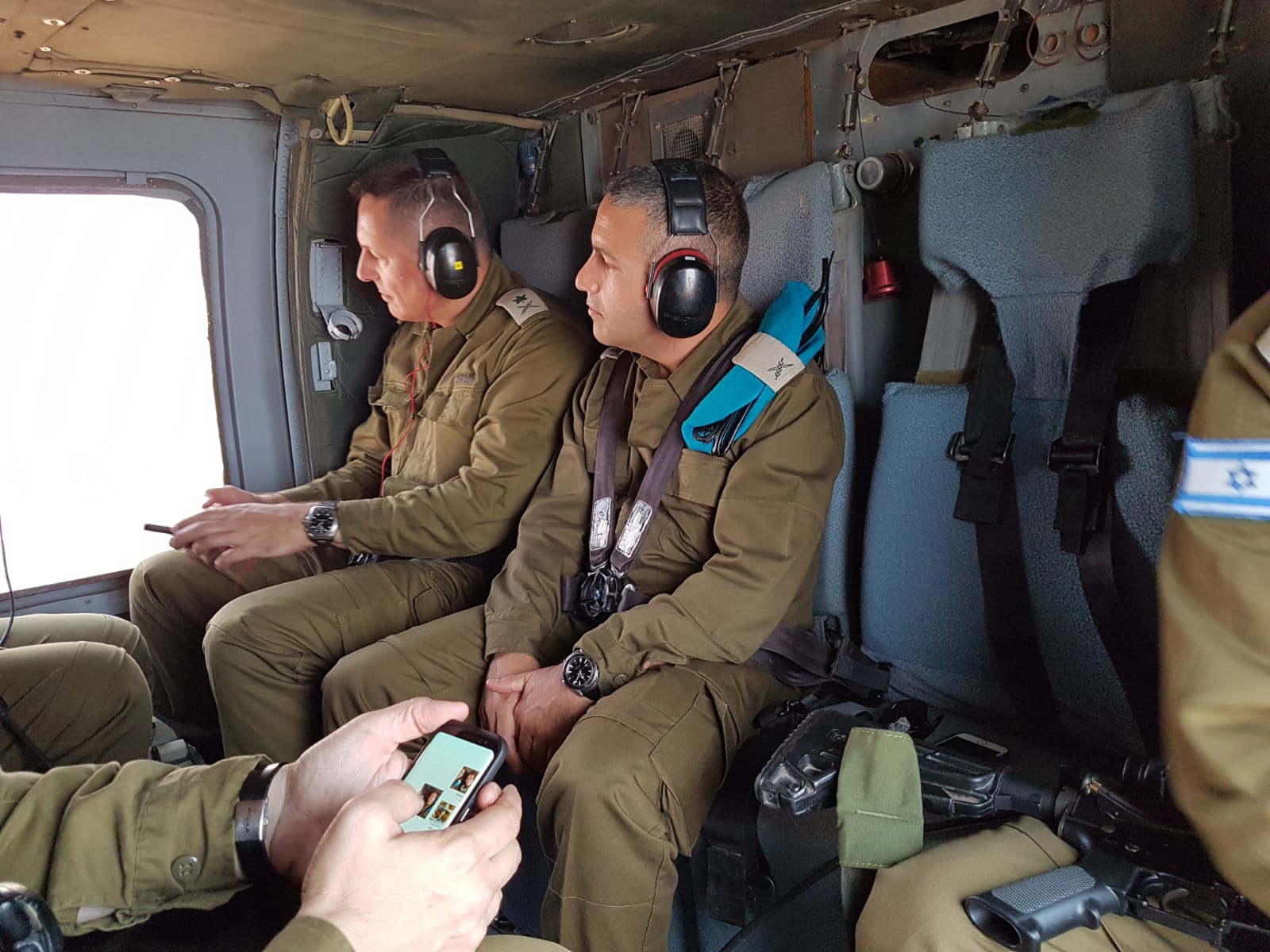 טיסה צבאית עם ראש אט"ל האלוף איציק תורג'מן